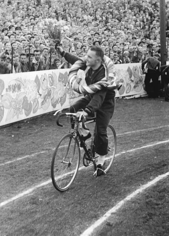 Maurice Boeck Zentralbild Kronfeld Bey-Ho 3.5.1955 VIII. Internationale Friedensfahrt Prag-Berlin-Warschau. Auf der ersten Etappe "Rund um Prag". UBz: Der belgische Etappensieger Maurice Boeck auf der Ehrenrunde.